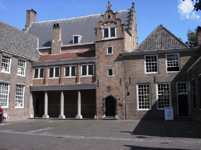 Dordrecht (Nederland). Het Hof (of De Hof), voormalig Augustijnenklooster, ingang vanaf Voorstraat nr. 214 of vanaf Steegoversloot.